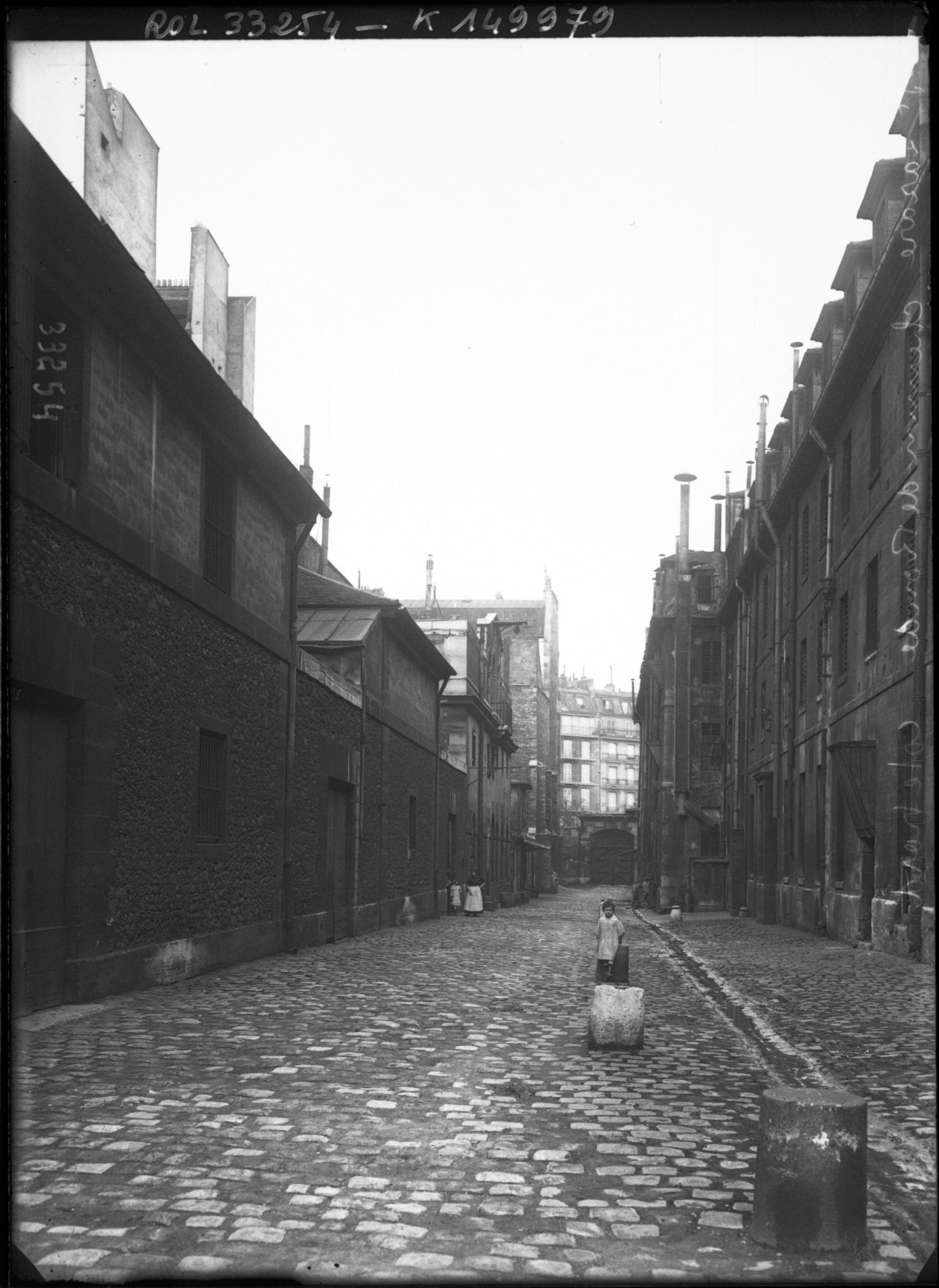 Prison Saint-Lazare, le chemin de ronde côté nord